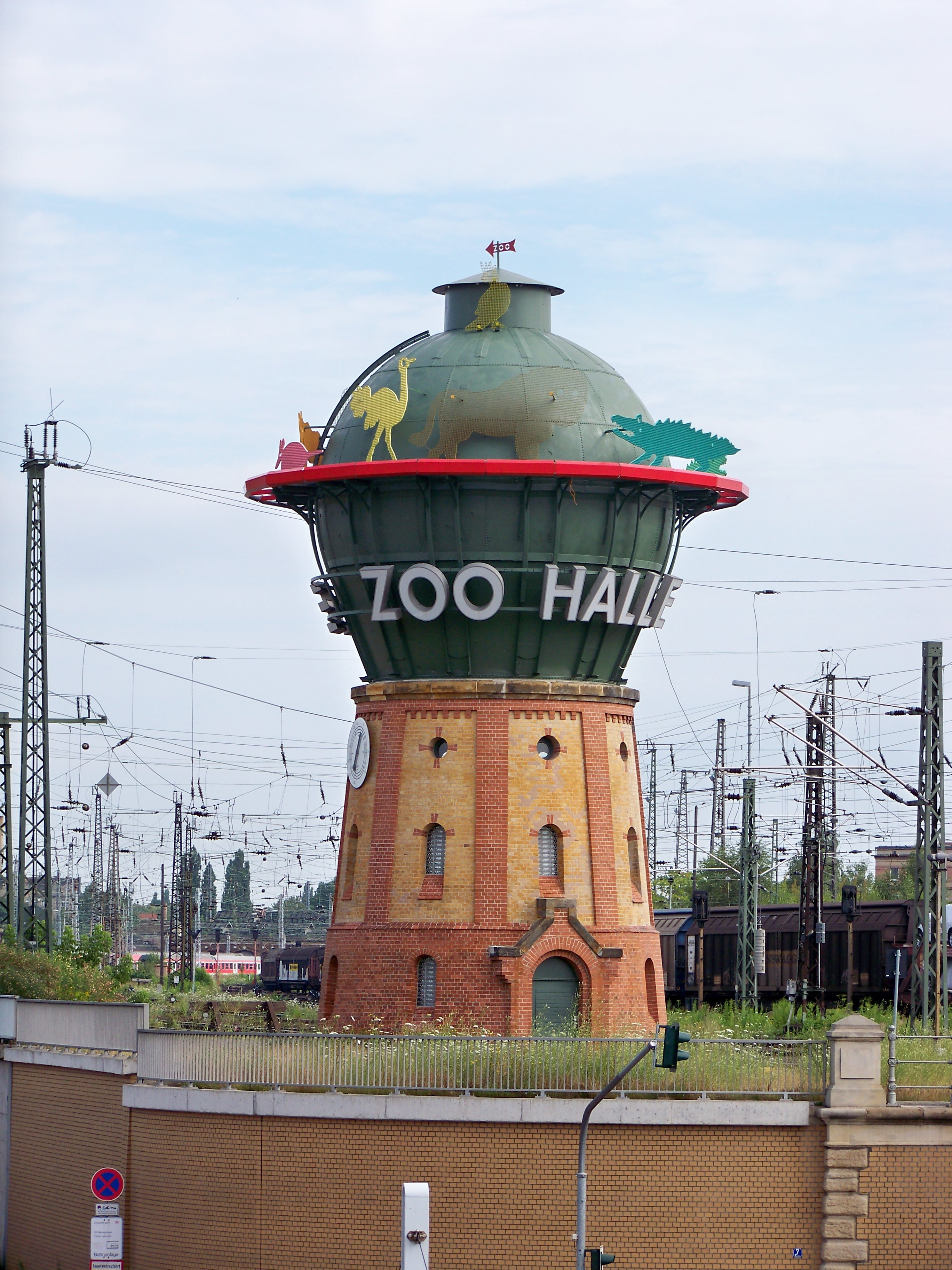 Sanierter Wasserturm auf dem Gelände des Hauptbahnhofes in Halle (Saale) mit Werbung für den Zoo Halle